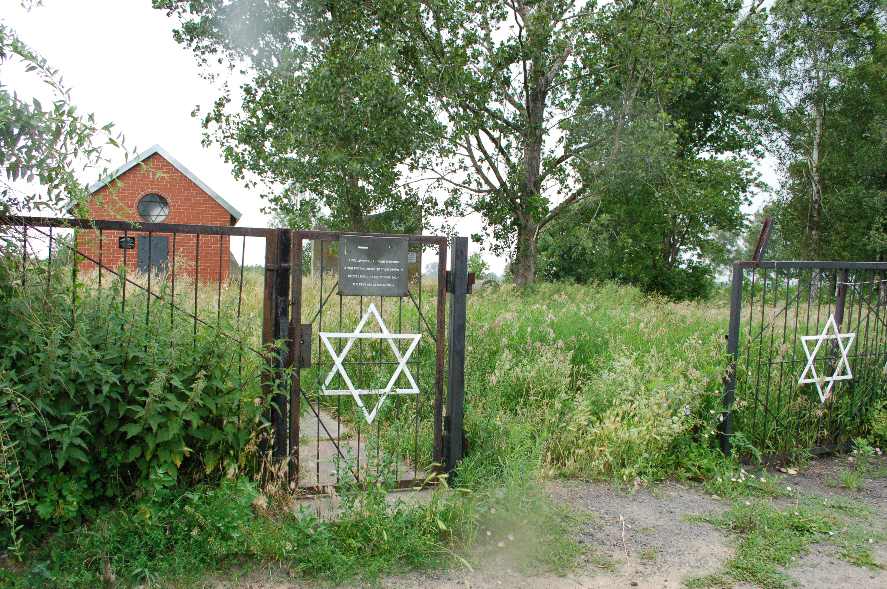 Sochaczew